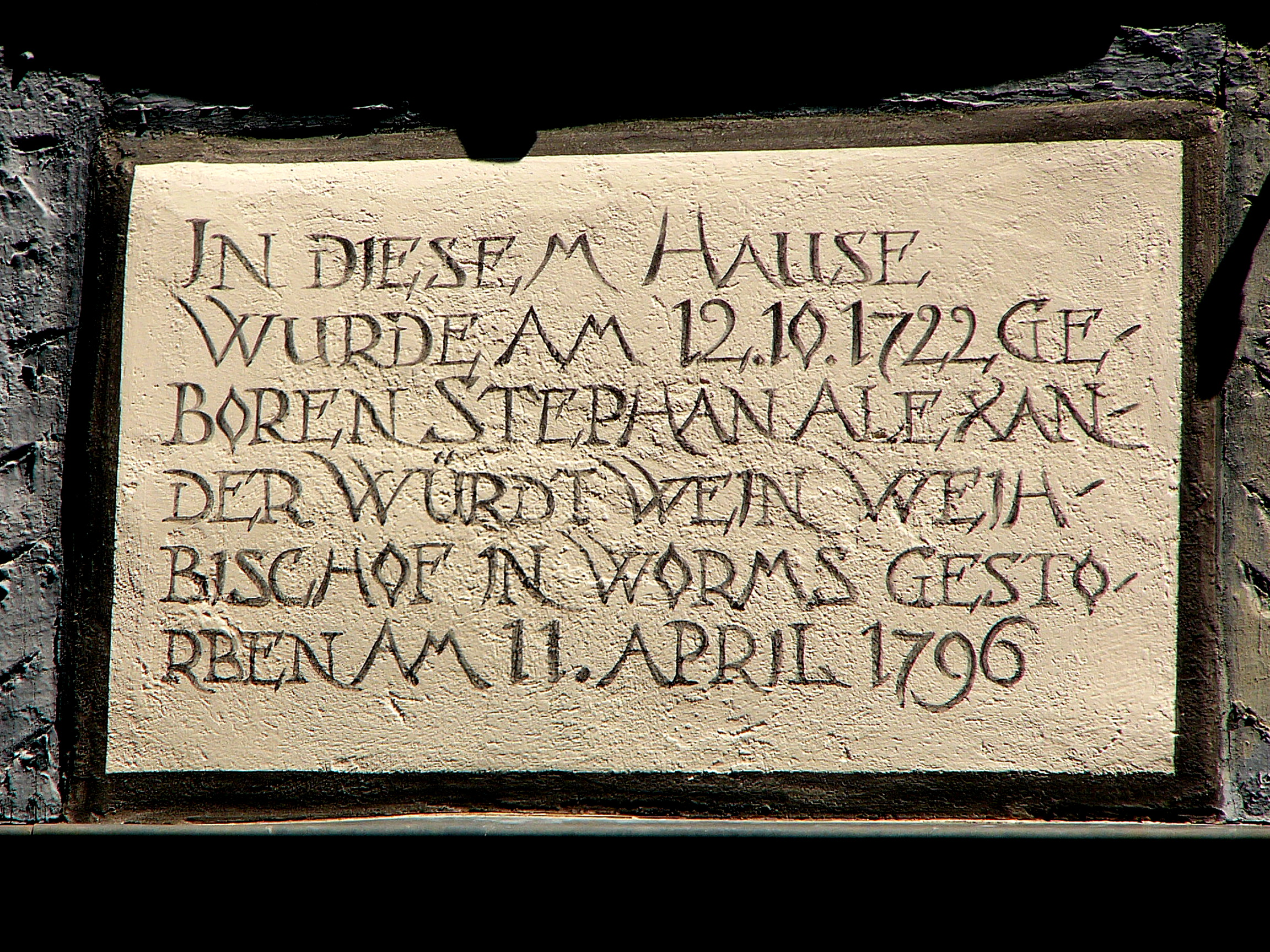 Tafel am Geburtshaus von Stephan Alexander Würdtwein in der Pfarrgasse 3 in Amorbach.